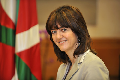 Idoia Mendia politikari sozialista.